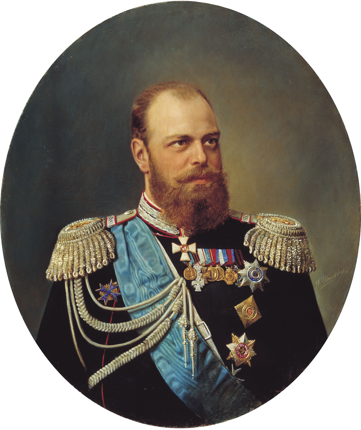 Alexander III // «Портрет Александра III» Холст, масло 89 х 75 Центральный военно-исторический музей артиллерии, инженерных войск и войск связи